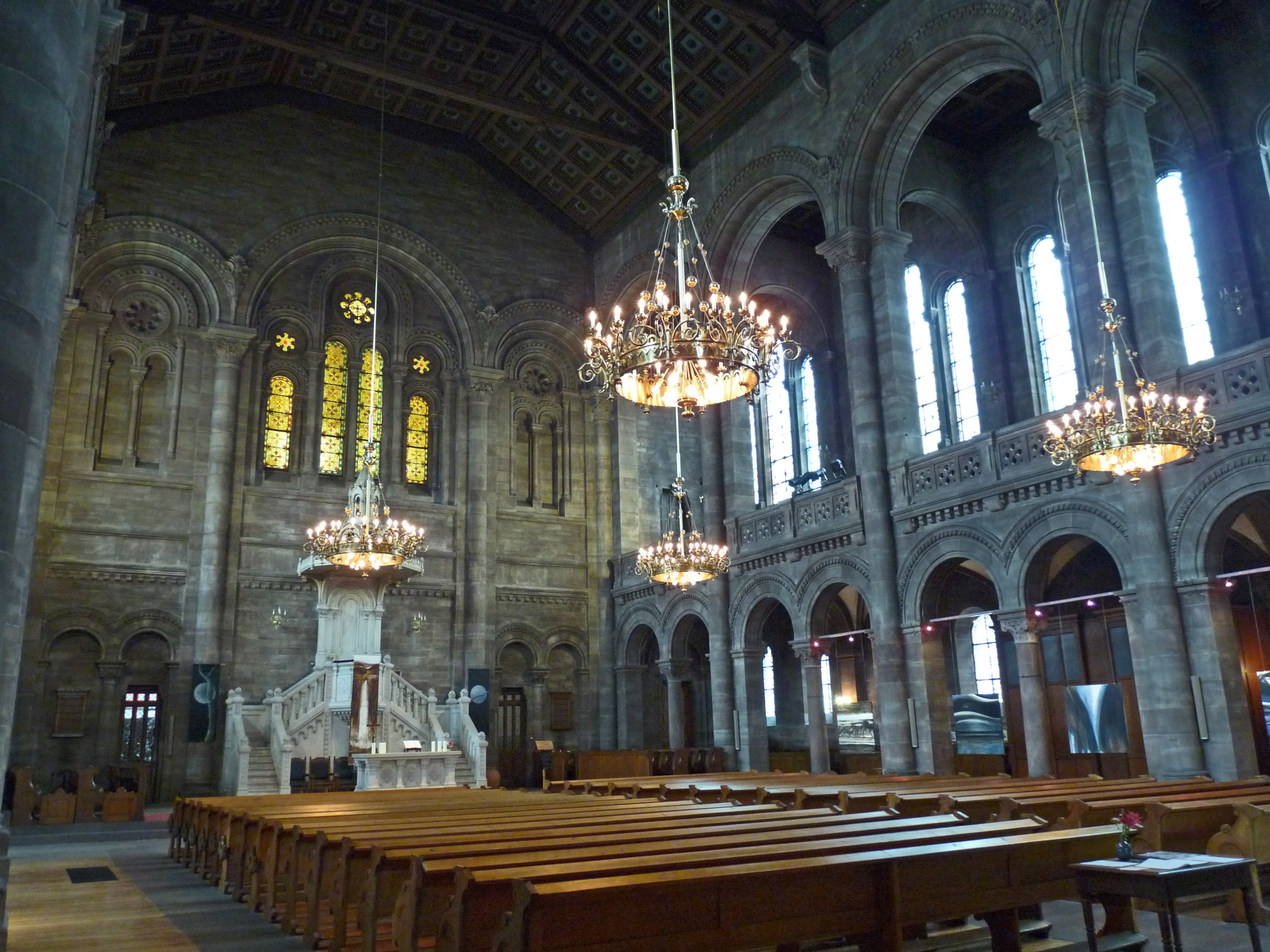 Eglise du Temple Neuf (Strasbourg)